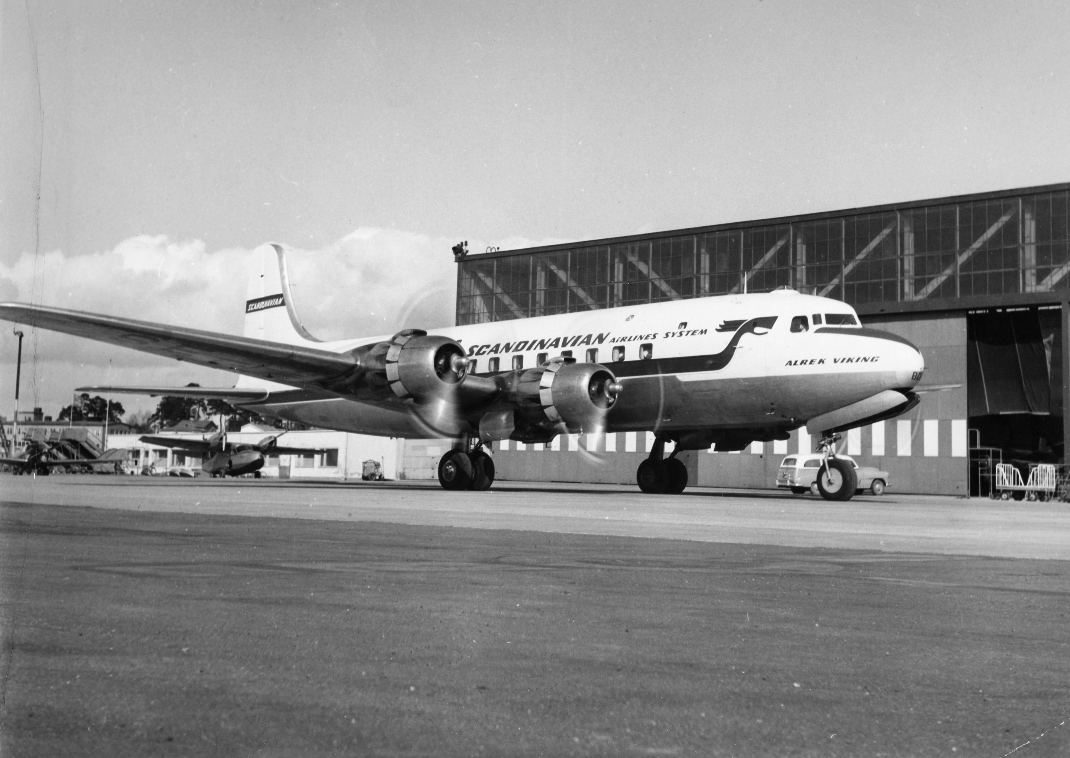 SAS DC-6, Alrek Viking SE-BDE at Bromma Airport, Stockholm, Sweden